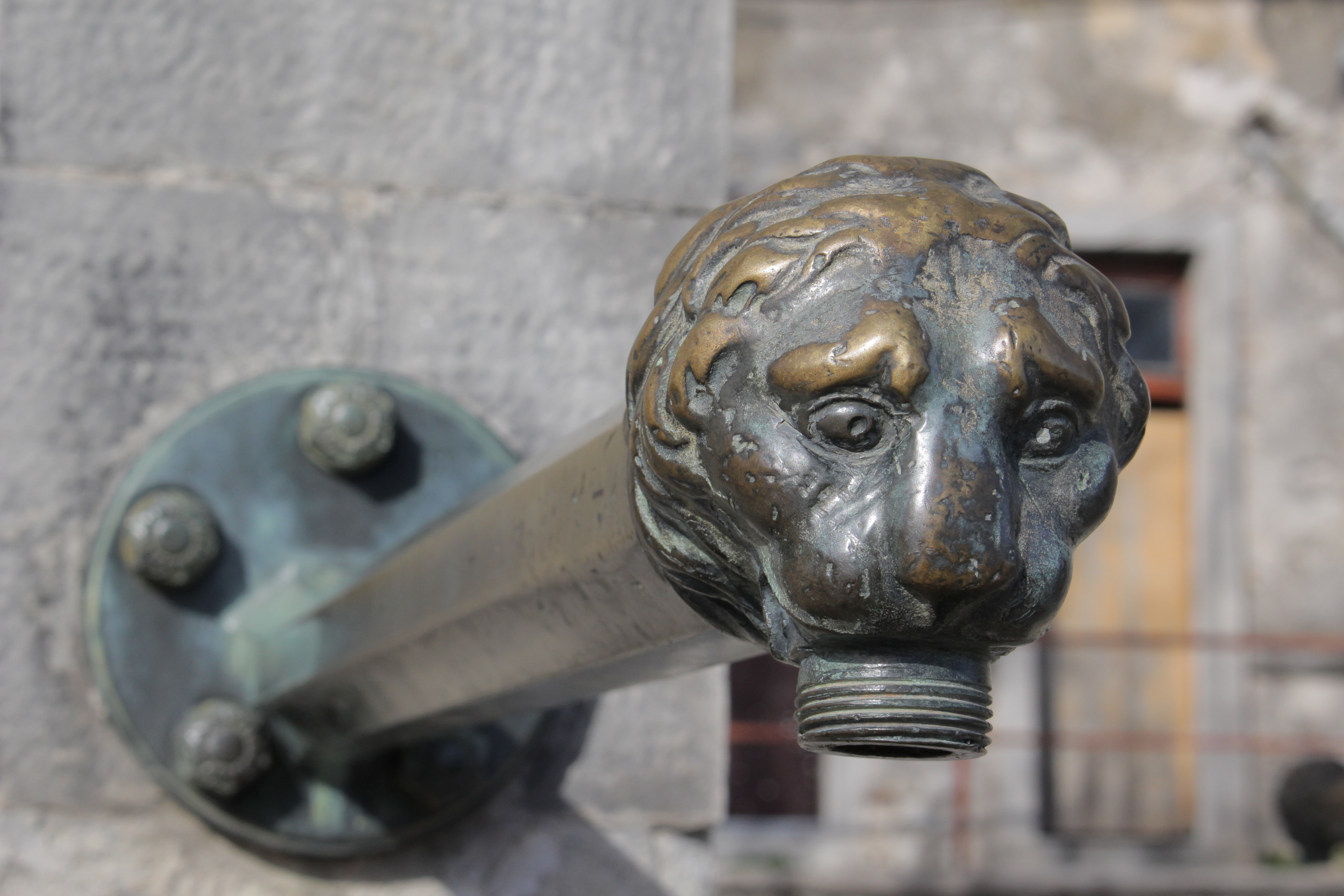 fontana